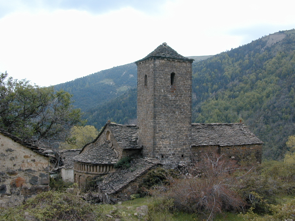 Aragonés: Ilesia de Sant Miguel d'Otal